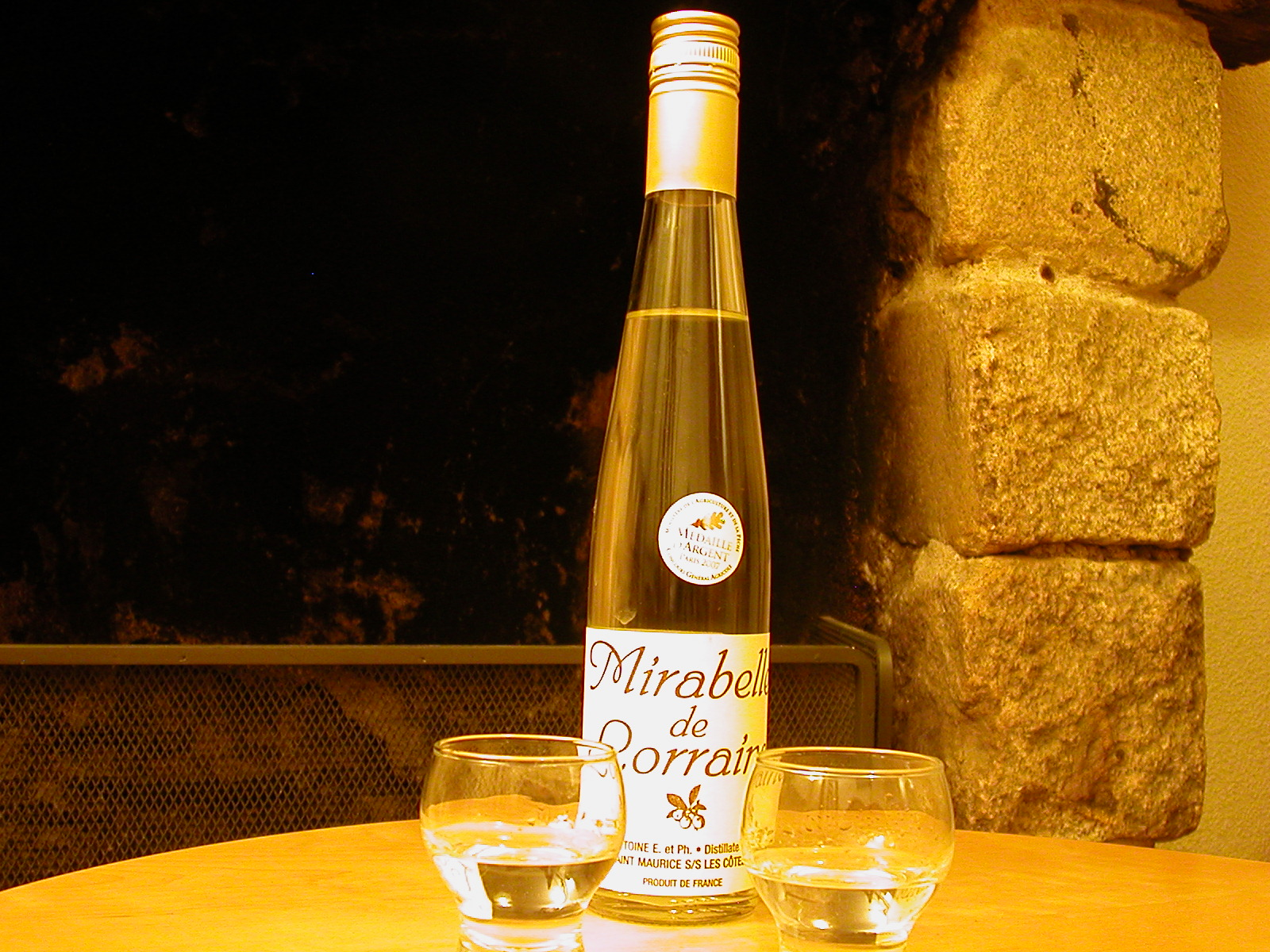 bouteille d'eau de vie de mirabelle, spécialité lorraine